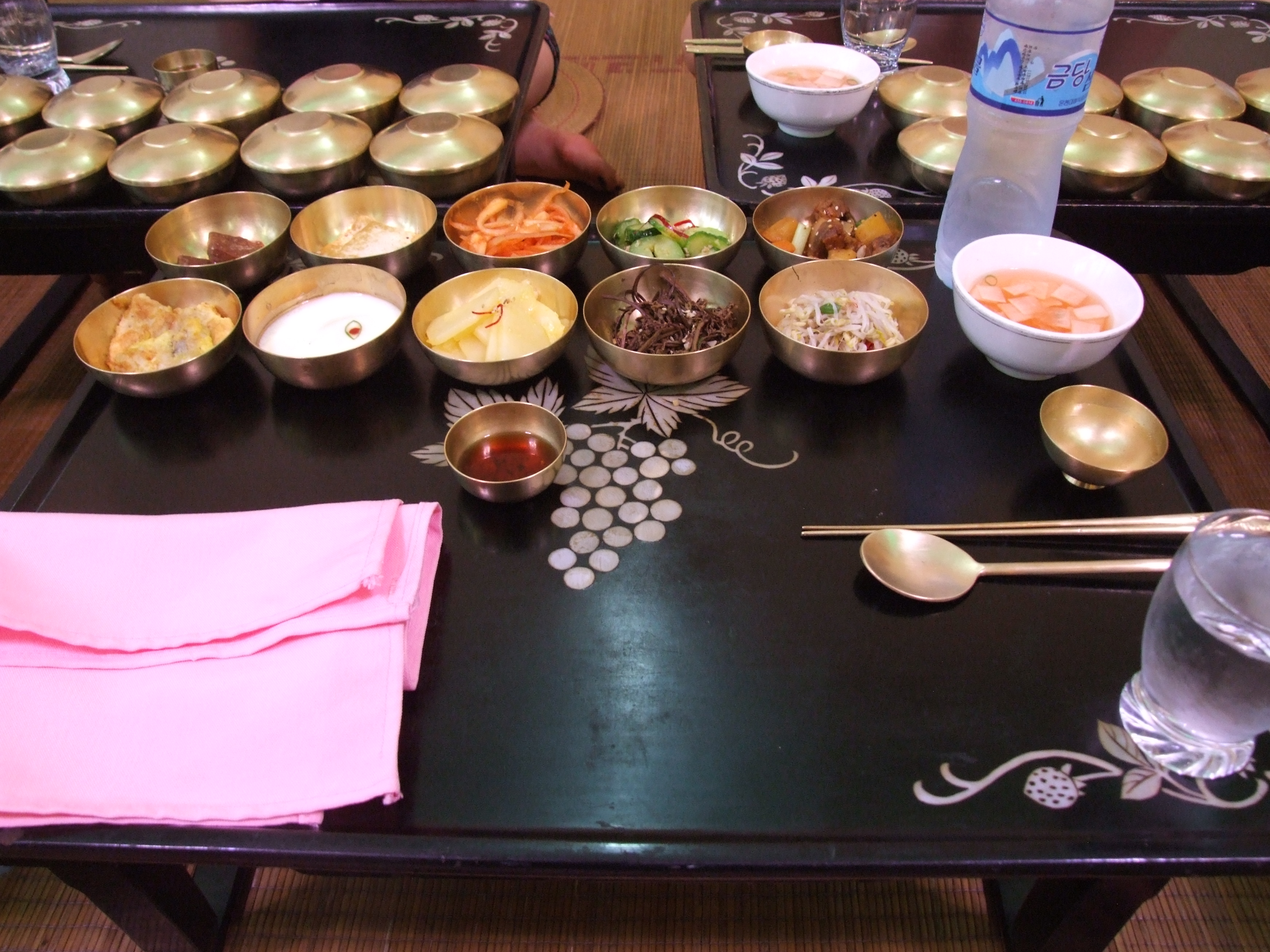 Dinner at Folk Custom Hotel, Kaesong